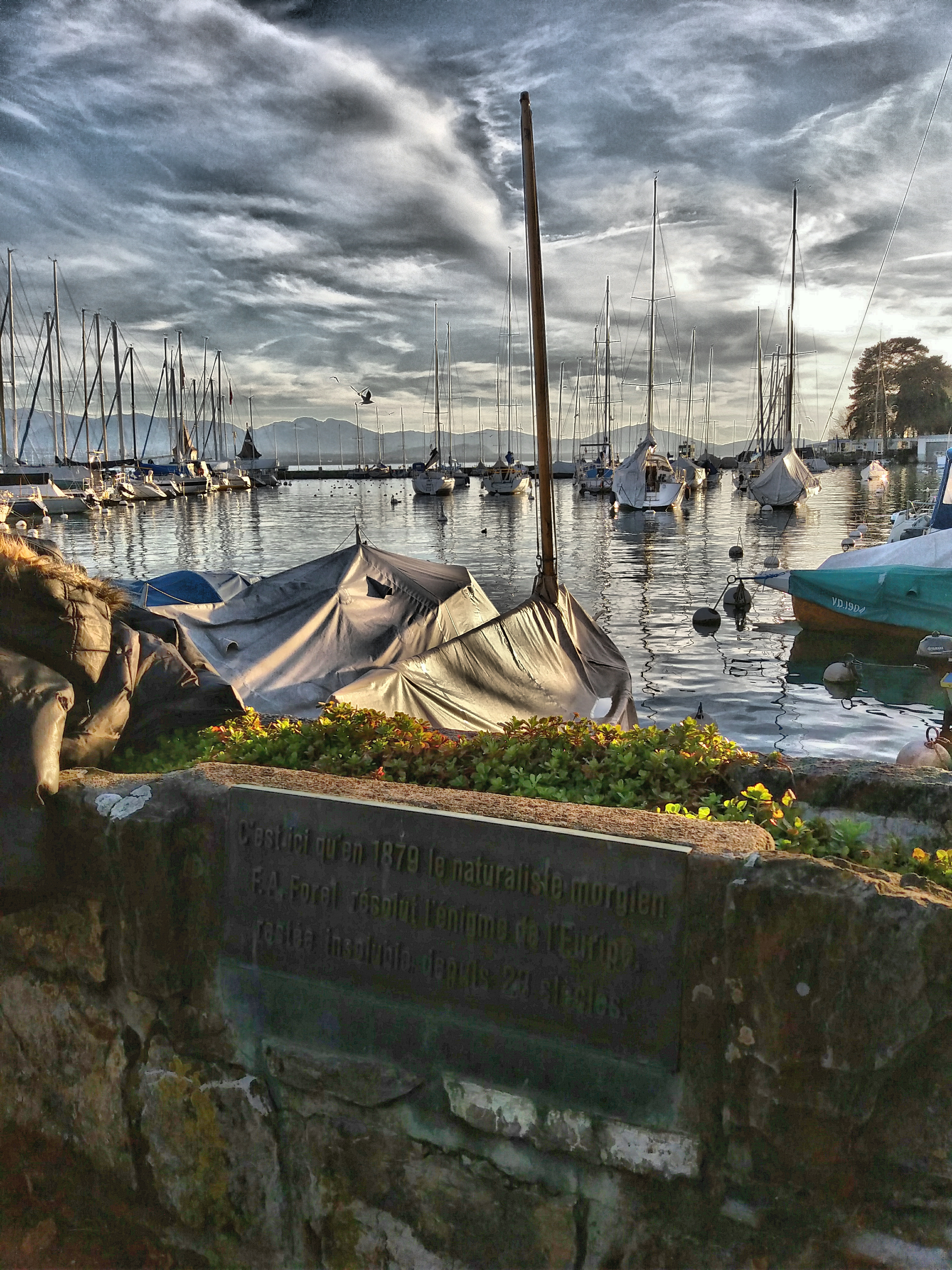 Plaque commémorative où F.-A. Forel résolut (une part) de l'énigme de l'Euripe